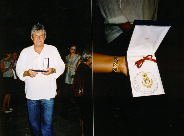 Harald Birklhuber 2003